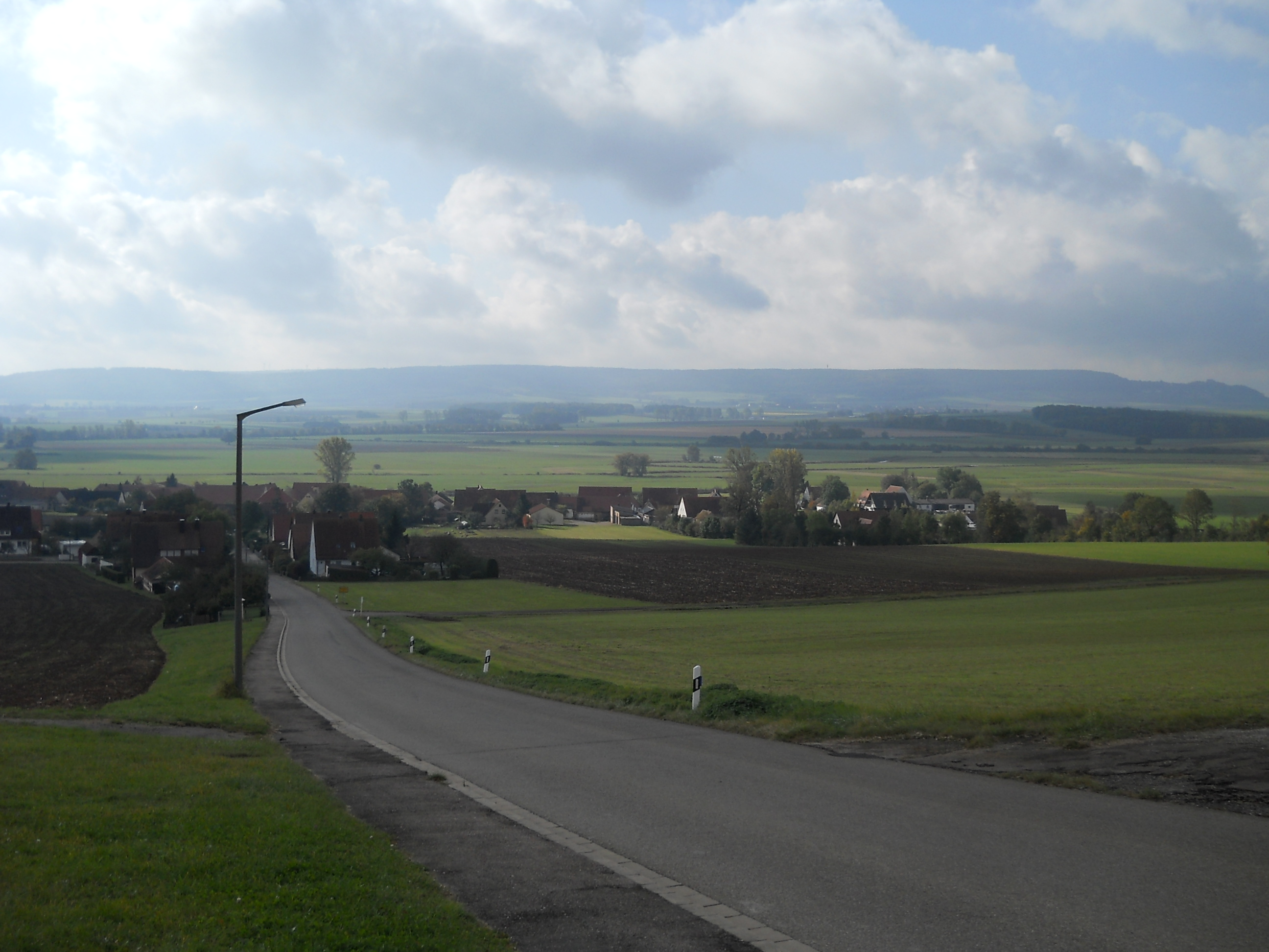 Unterasbach, Ortsteil von Gunzenhausen im mittelfränkischen Landkreis Weißenburg-Gunzenhausen (Bayern), Blick von der exponiert auf dem Altmühl-Talrand gelegenen evangelischen Pfarrkirche St. Michael auf Unterasbach und den Altmühlgrund